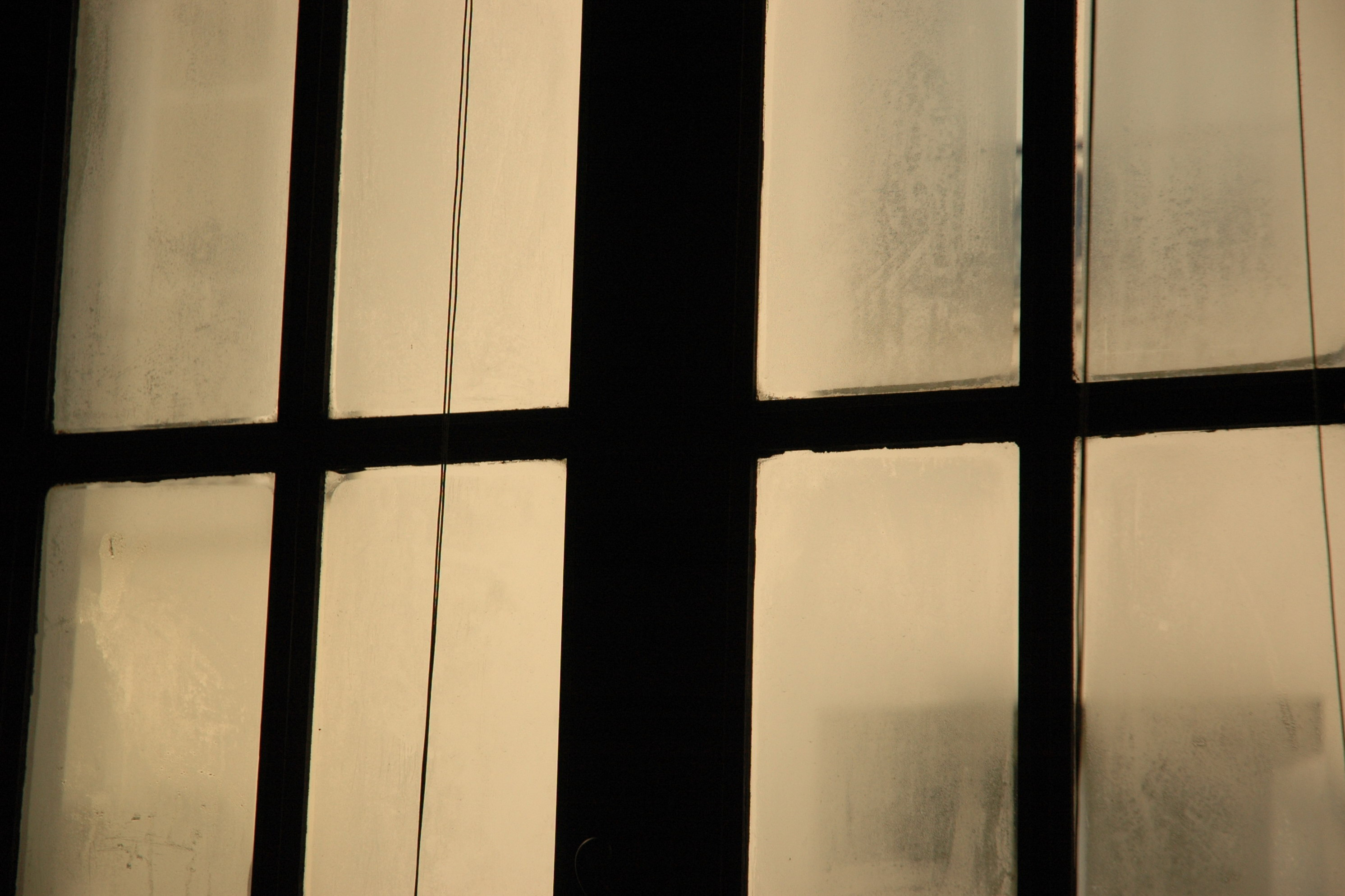 Buée